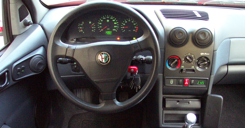 Alfa 145 1.4 TwinSpark L Modelljahr 1996-1998 Cockpit